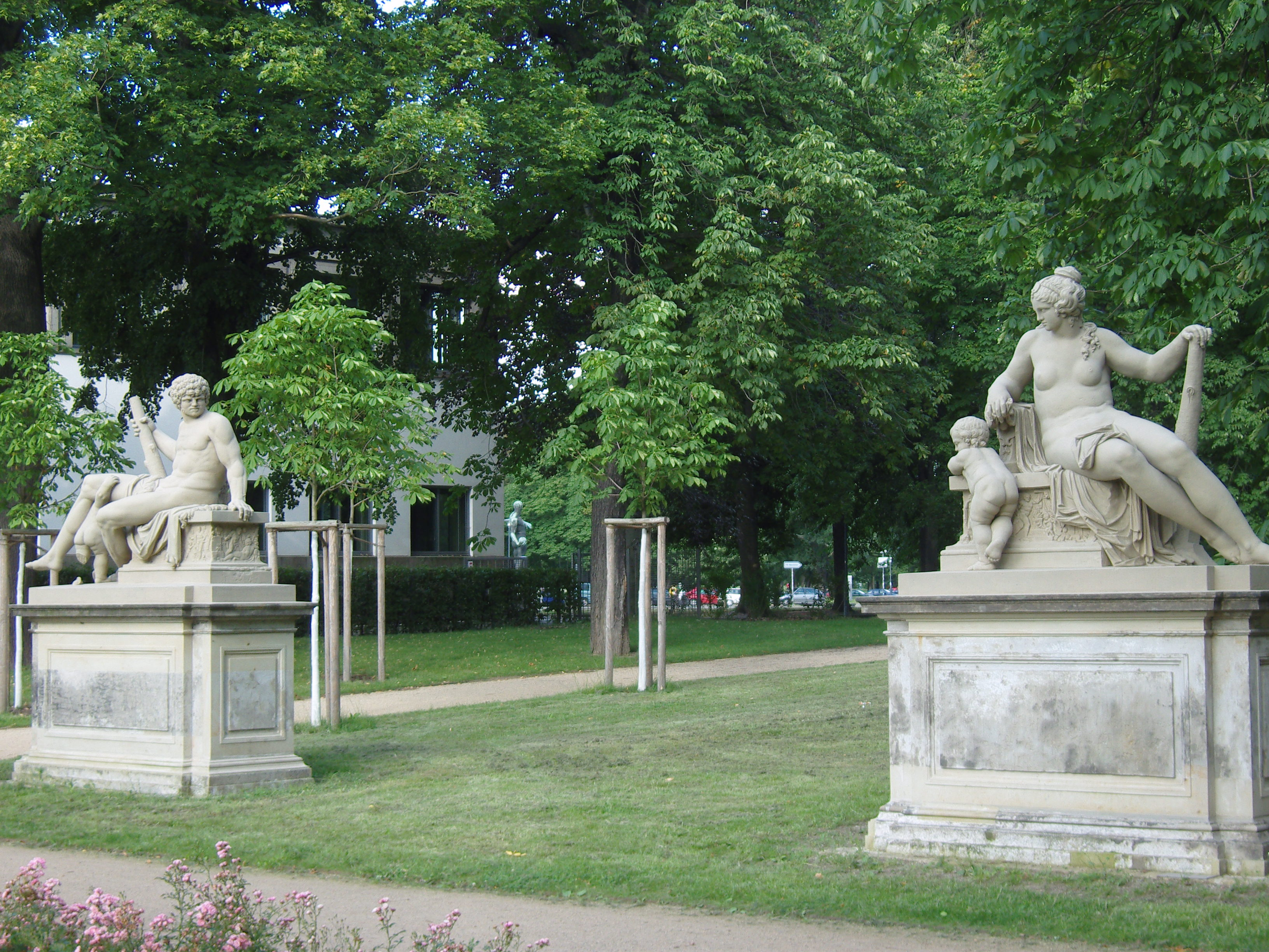 Statuen von Herkules und Megara im Blüherpark in Dresden